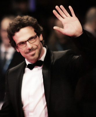 Actor Francesco Montanari - Romanzo Criminale - Red Carpet